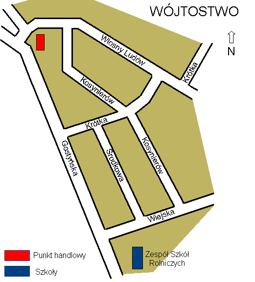 Śrem, Wójtostwo, plam osiedla.